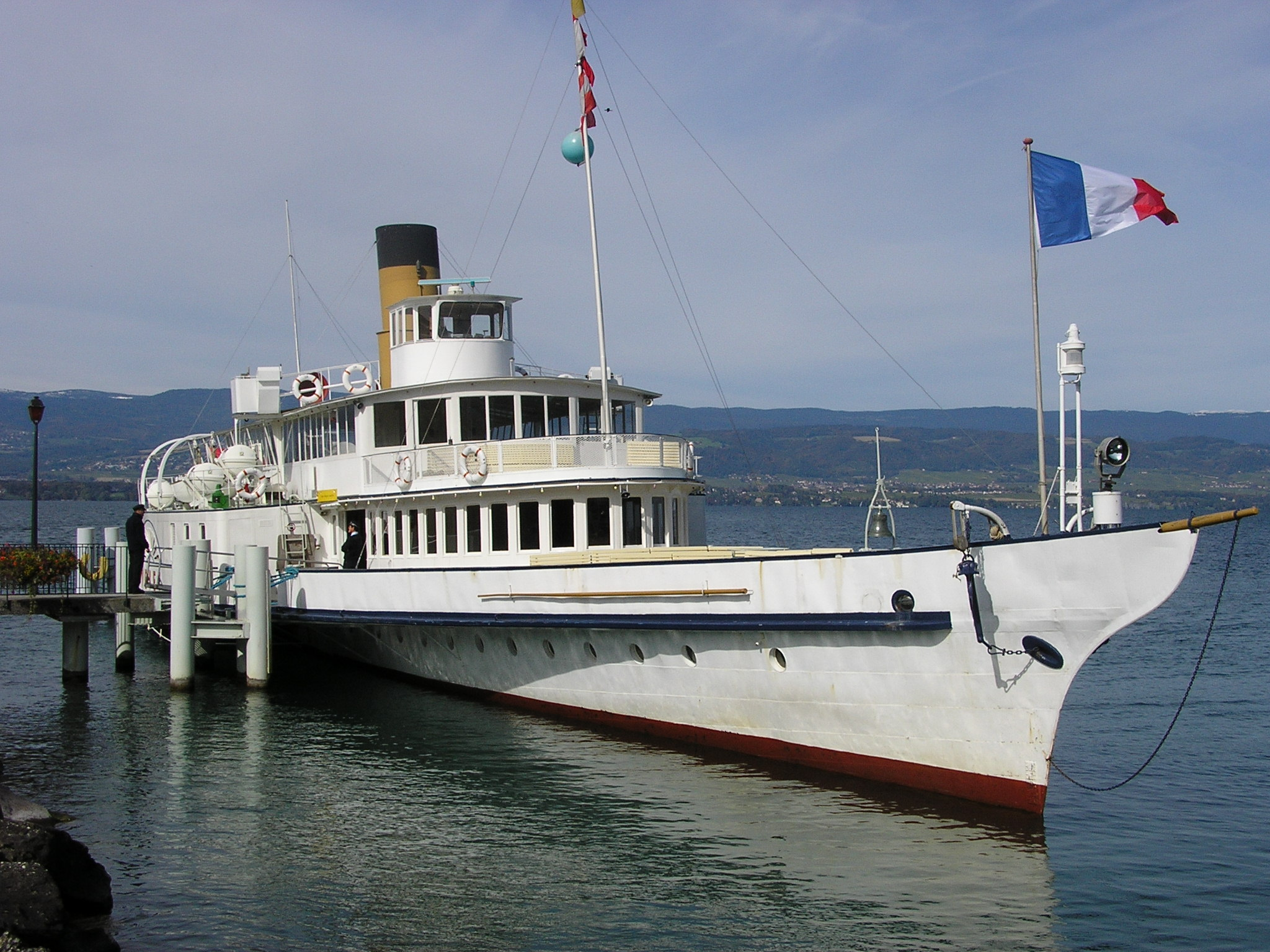 Le Vevey, bateau de la Compagnie générale de navigation sur le lac Léman (CGN), à Yvoire le 5 octobre 2008